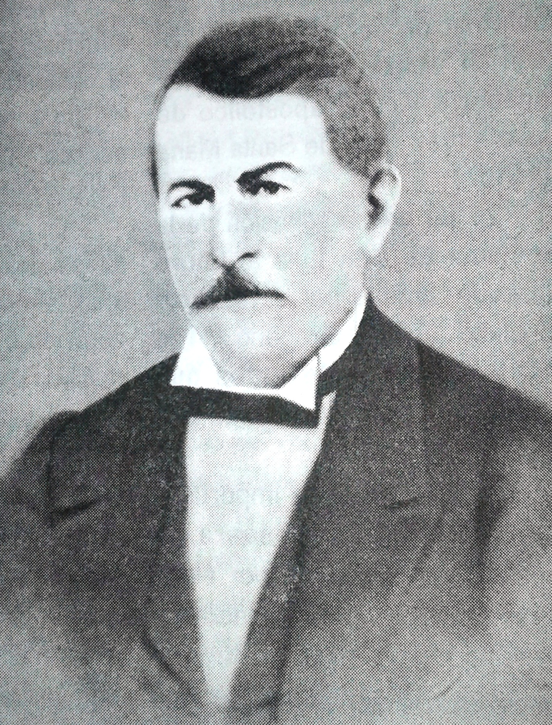 Gobernador de San Luis